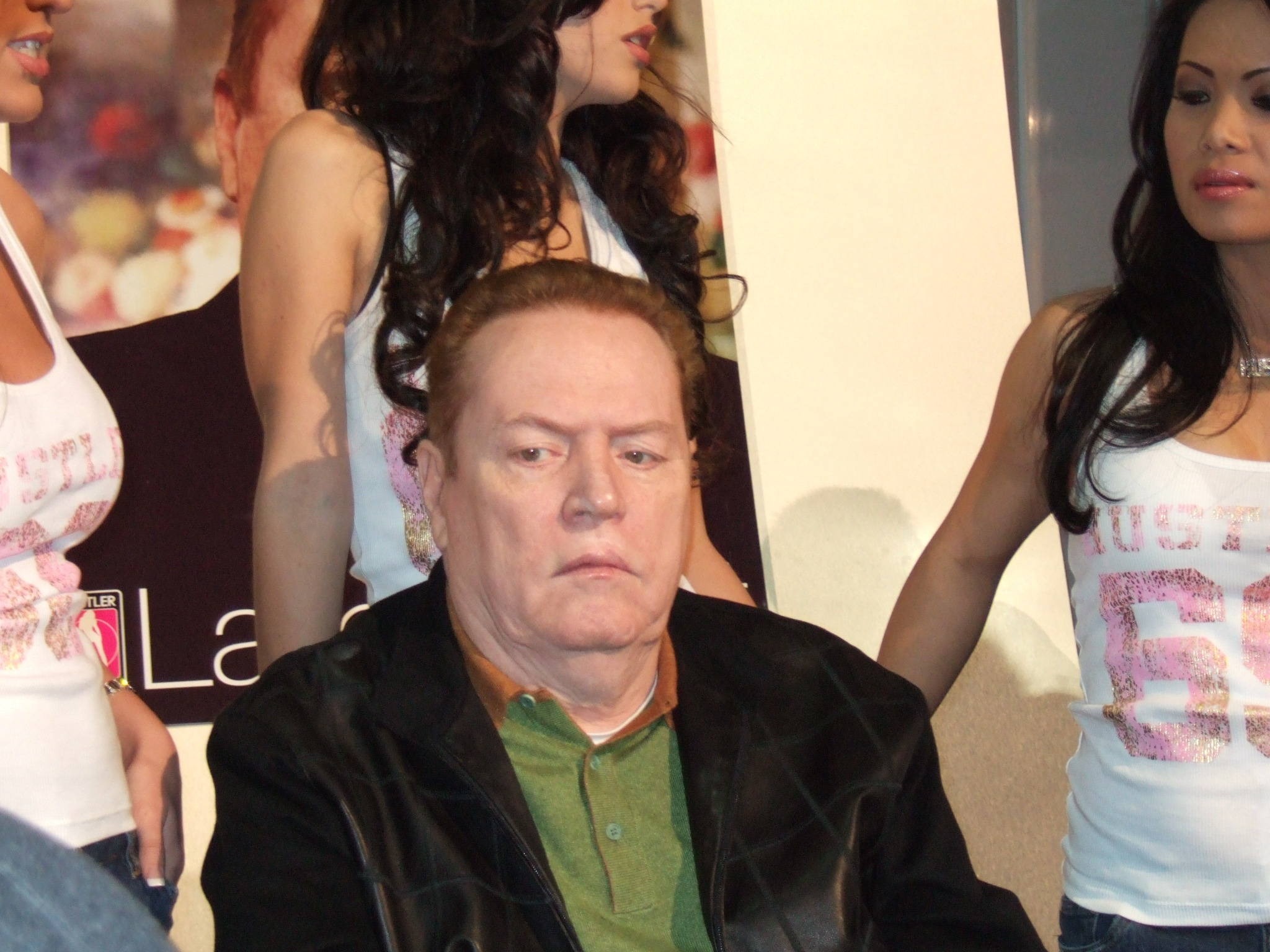 Larry Flynt